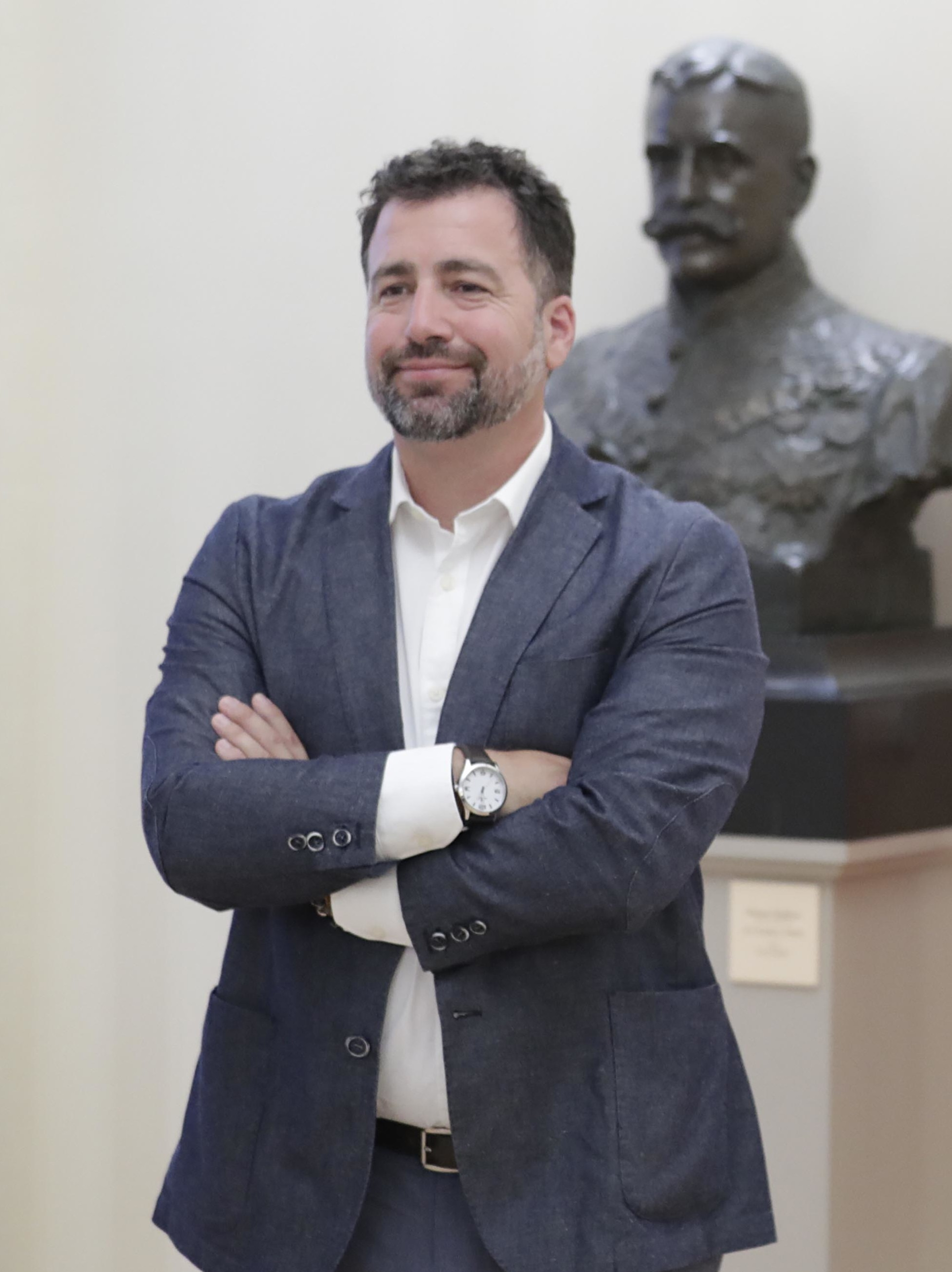 Reunión entre Pedro del Cura, alcalde de Rivas-Vaciamadrid, y Cristina Cifuentes, presidenta de la Comunidad de Madrid